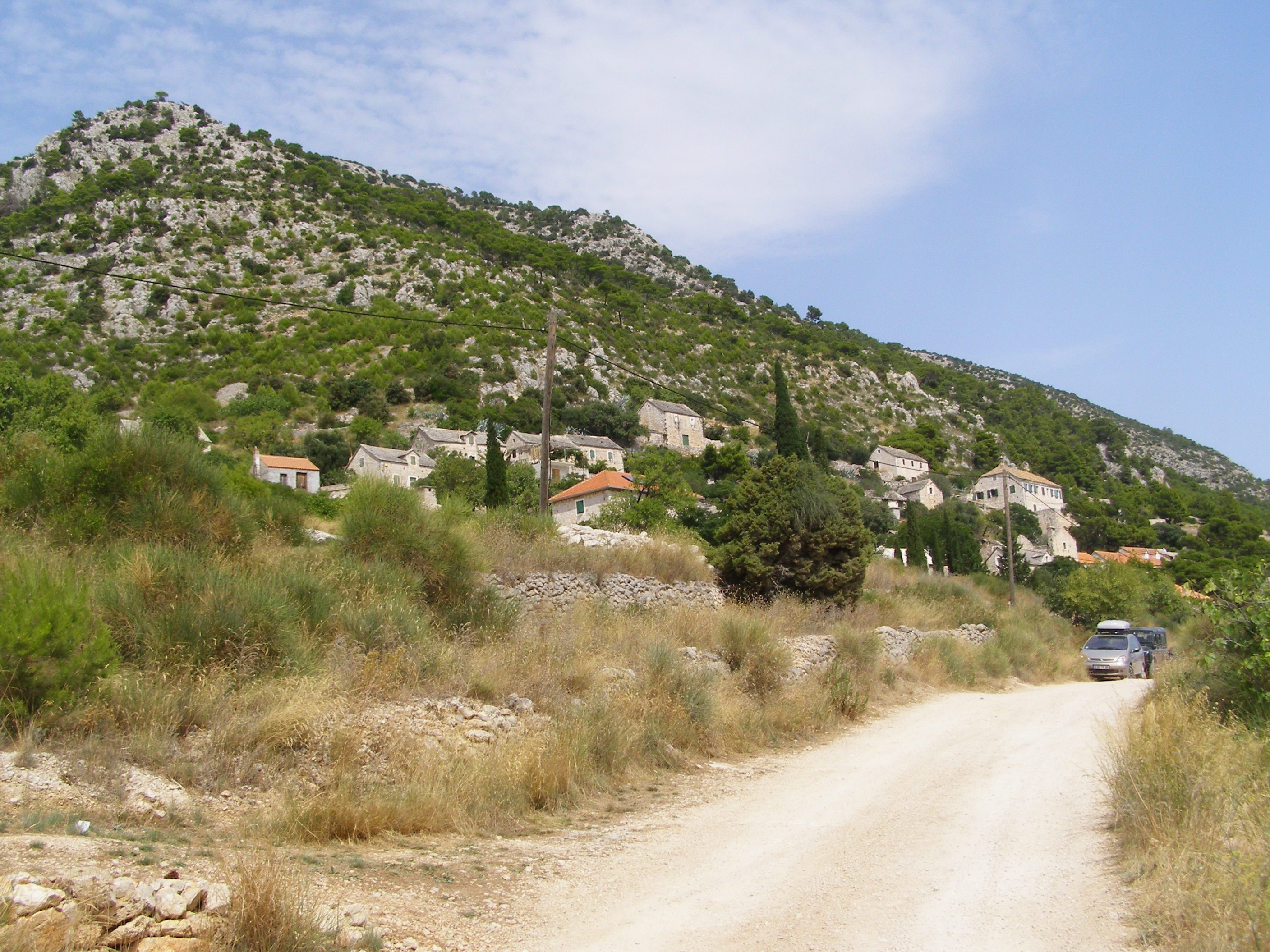 Murvica, Brac, Croatia